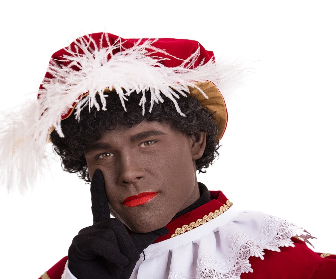 Piet Sancho